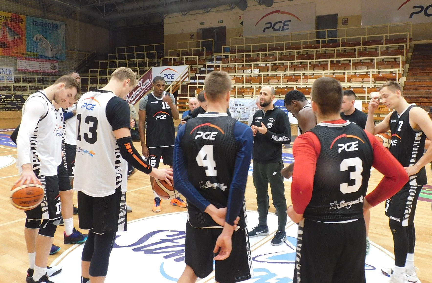 PGE Spójnia Stargard (26.09.2019)